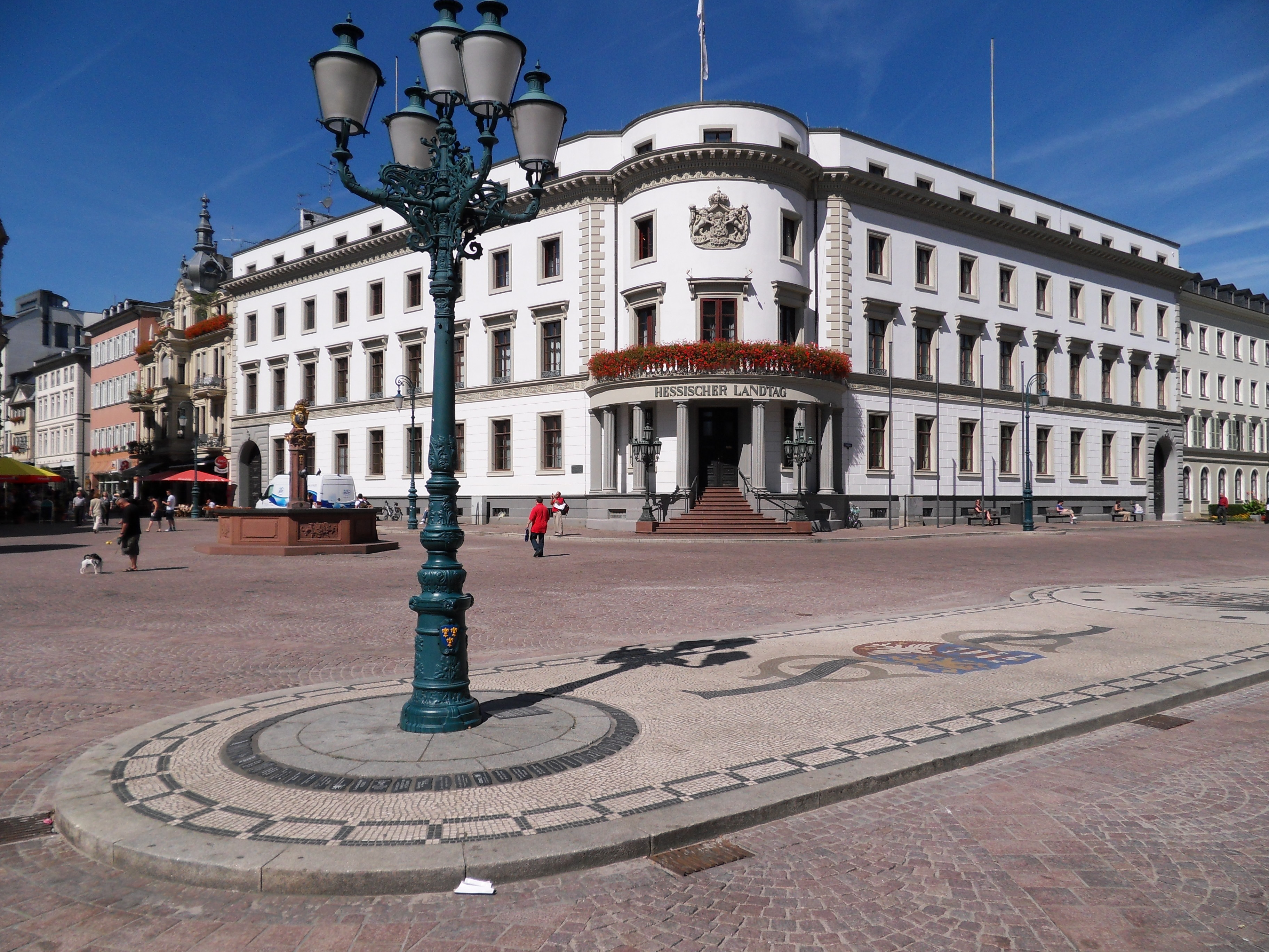 Sitz des Hessischen Landtags im Stadtschloss Wiesbaden. Blick von Südwesten über den Schlossplatz mit der restaurierten Wappeninsel mit den Wappen der preußischen Provinz Hessen-Nassau und des Königreichs Preußen aus buntem Mosaikpflaster, dazu ein historischer vierarmiger Kandelaber.